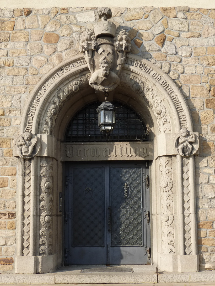 Eingang zum ehemaligen Verwaltungsgebäude der Bayerischen Braunkohlen Industrie AG in Wackersdorf (Oberpfalz)